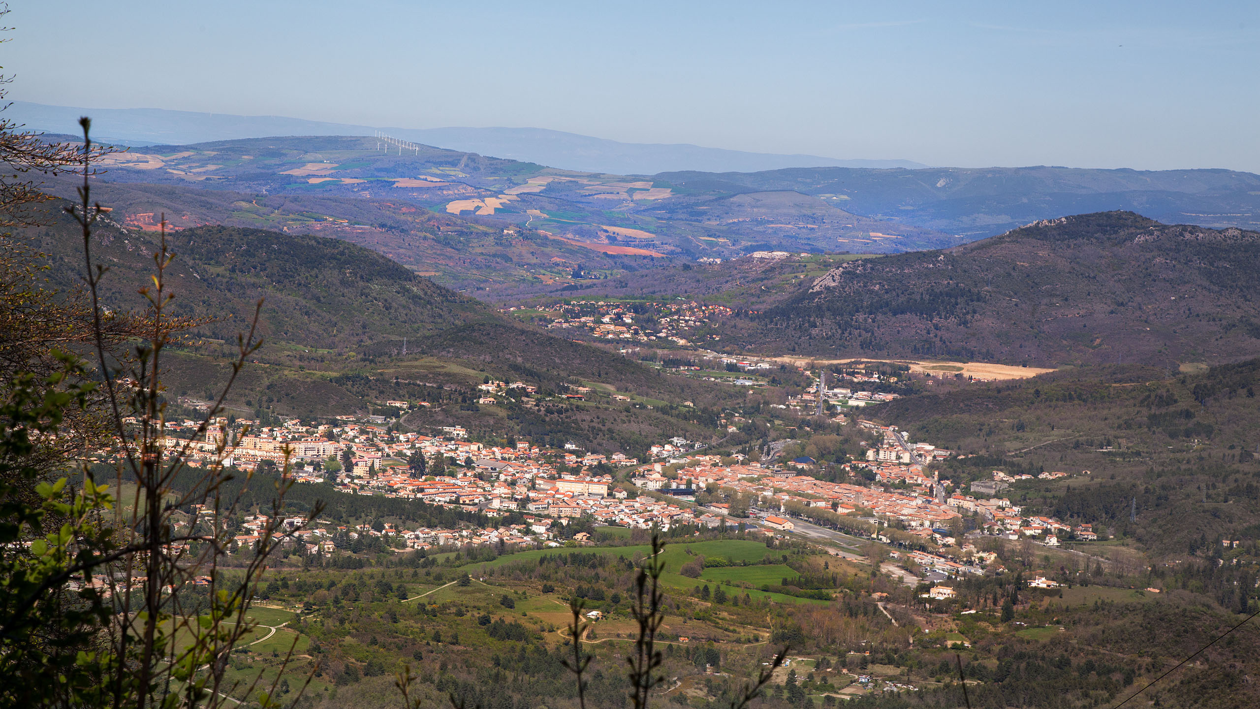 Vu de Carach